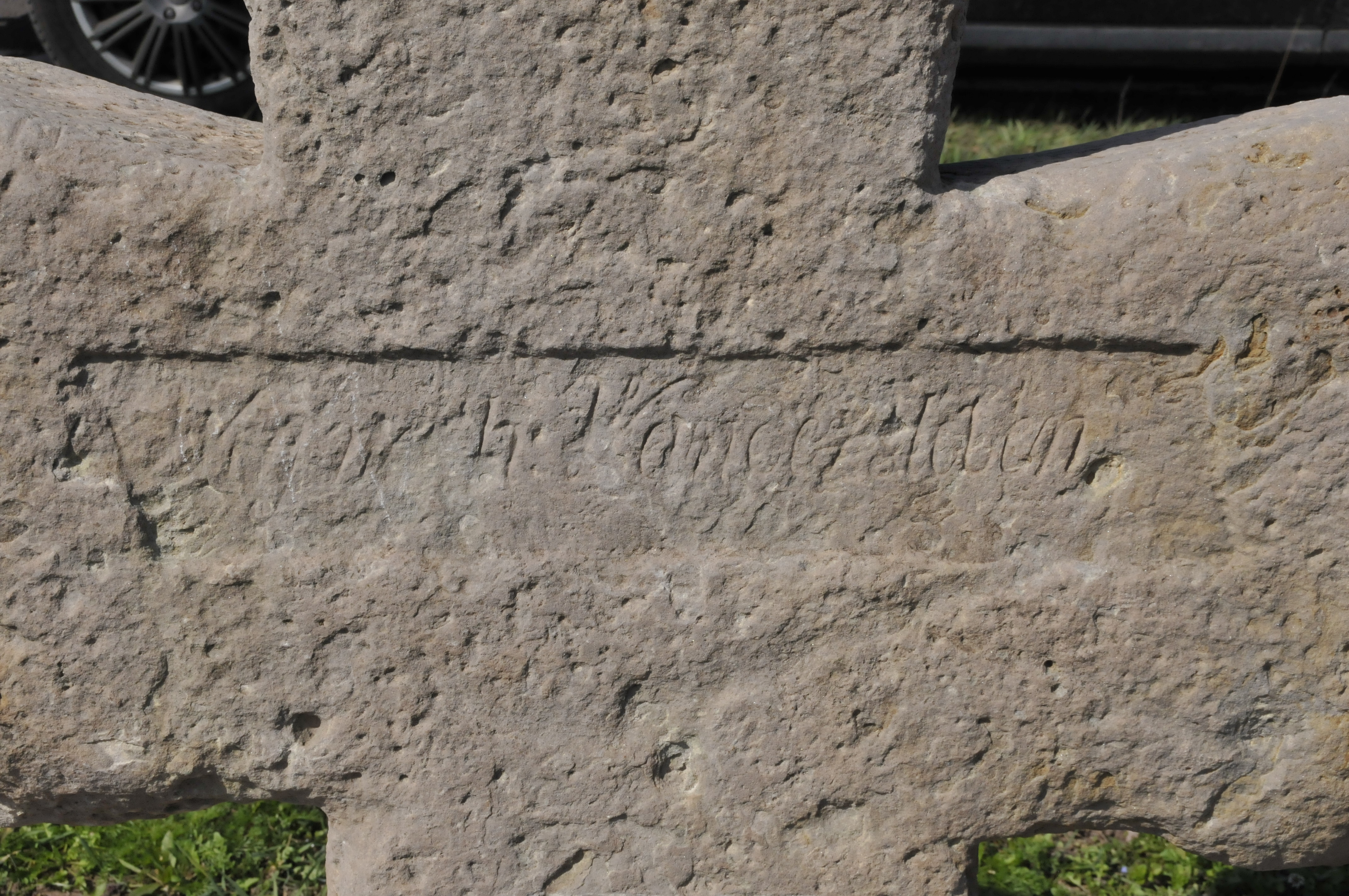 Freudenthal, Inschrift auf nördlichem Steinkreuz